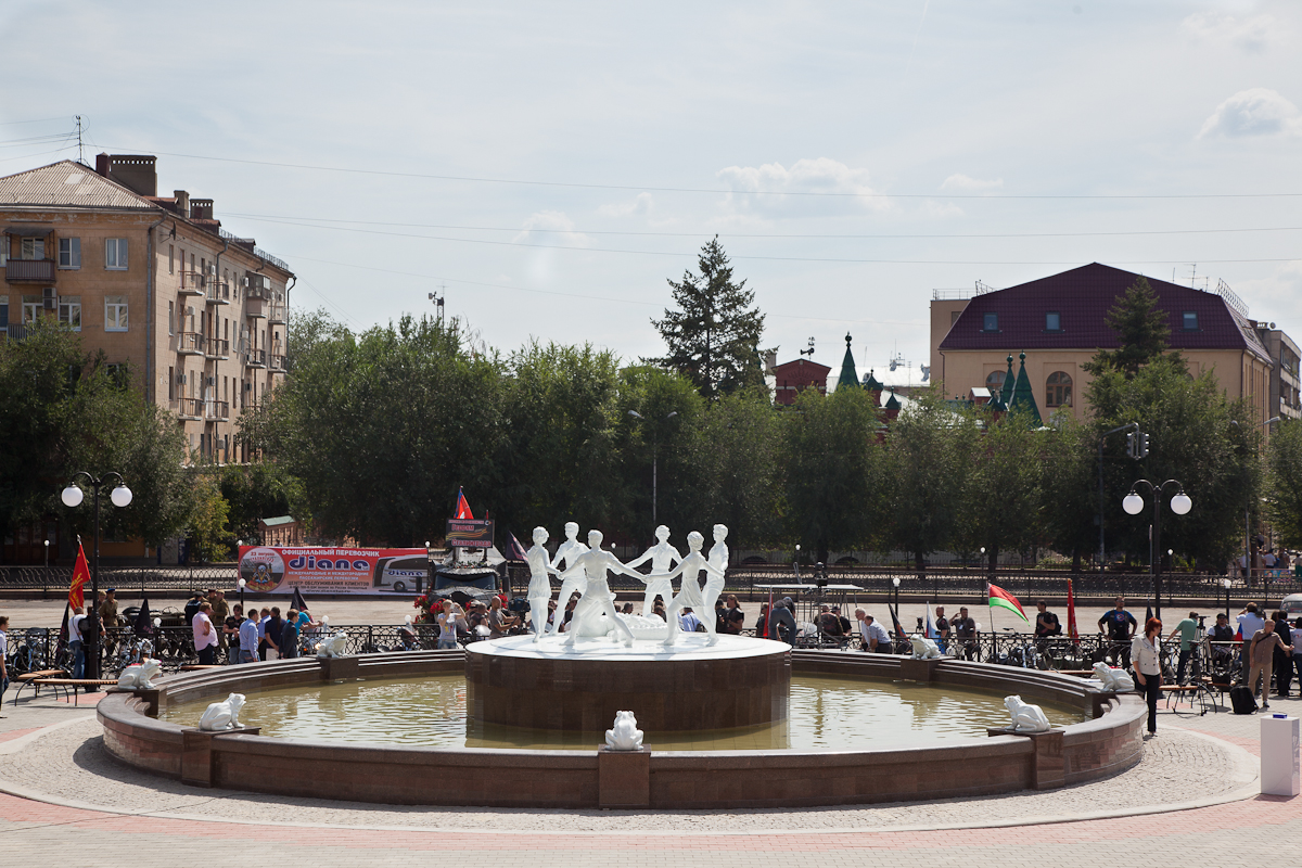 фонтан